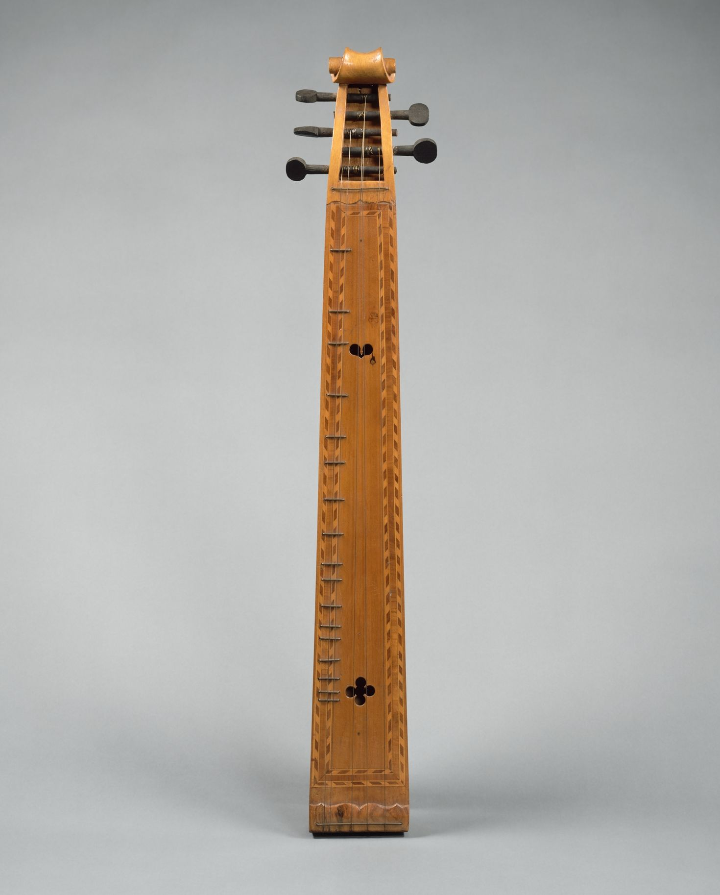 French; Épinette des Vosges; Chordophone-Zither-plucked